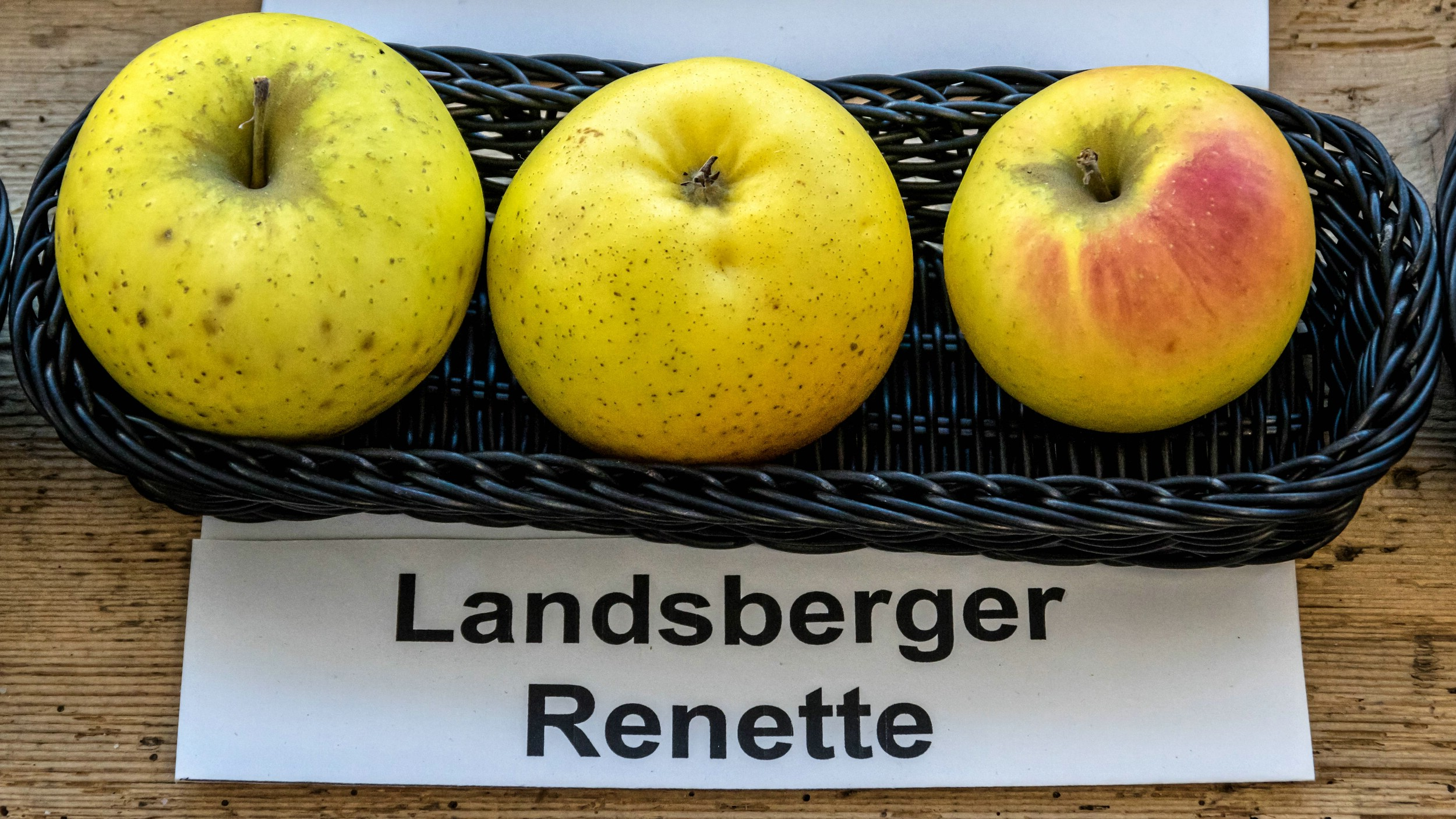 Alte Apfelsorten, von denen es im Badischen noch tragende Bäume gibt. Alle Aufnahmen au dem Oktober 2015